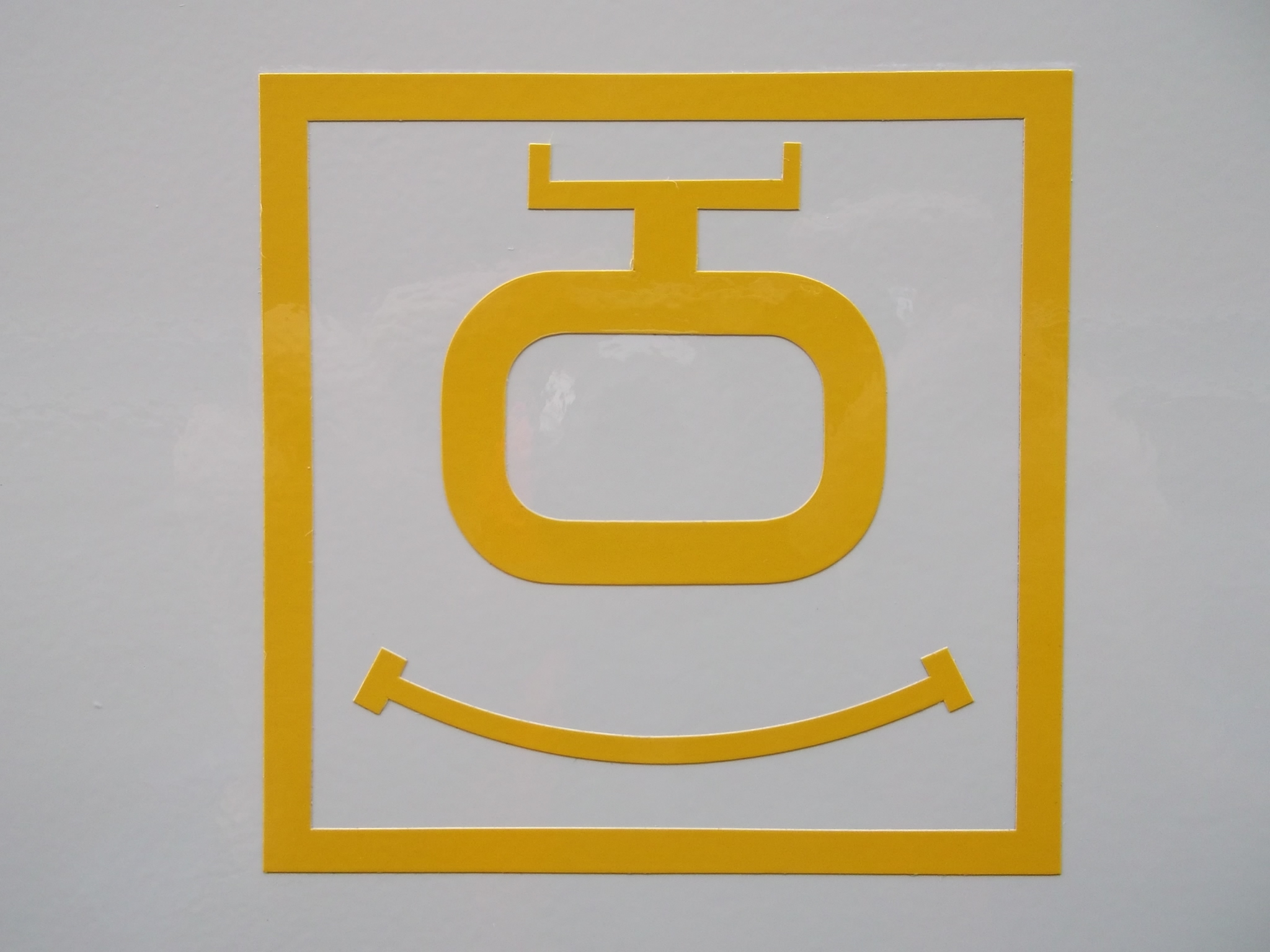 Bremsanschrift Notbremsüberbrückung eines Eisenbahnfahrzeuges der Deutschen Bahn - Steuerung über Informations- und Steuerleitung (IS)